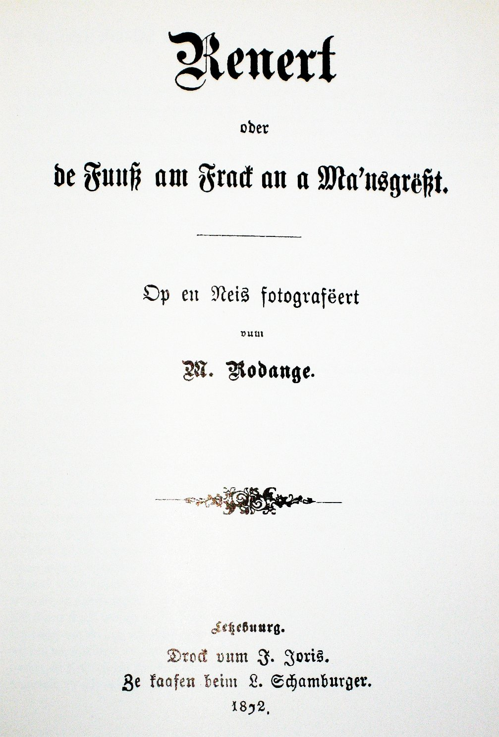 Facsimile vum bannenzeschten Titelblat vun der 1. Editioun vum Michel Rodange sengem Renert.]